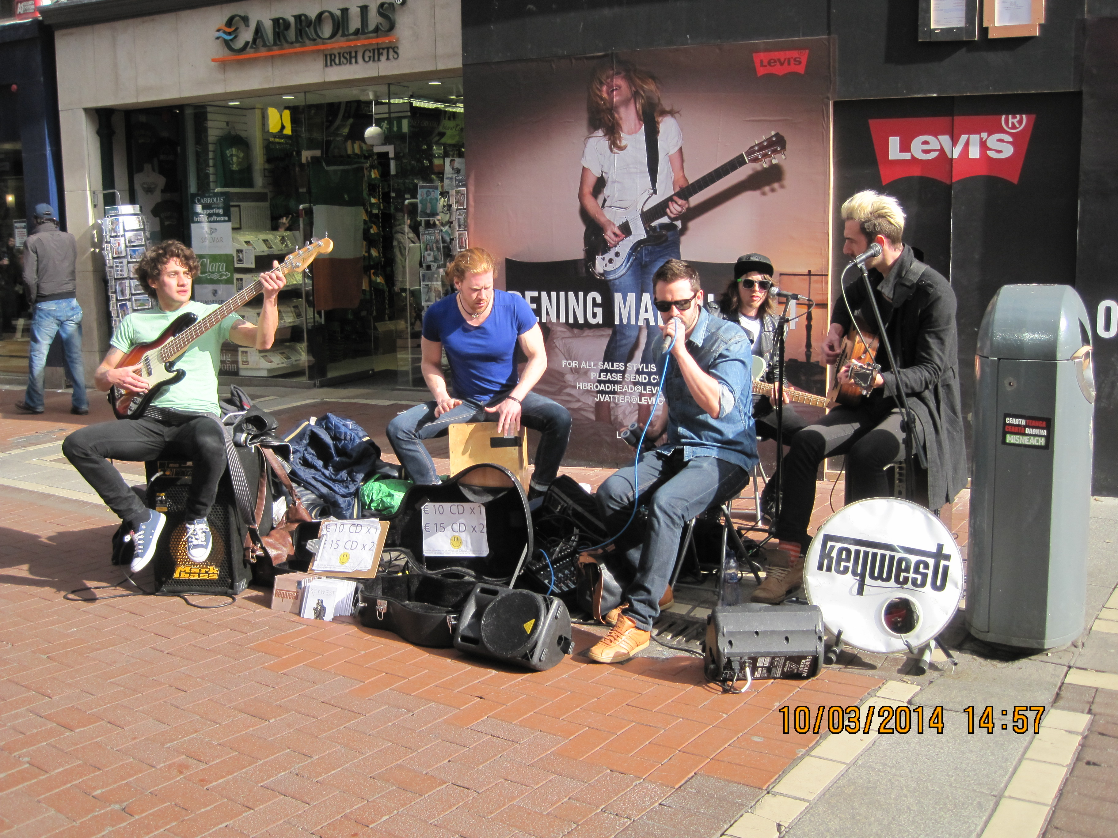 Keywest in der Grafton Street. März 2014